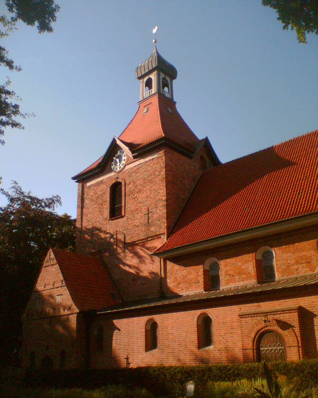 Südseite der Johanniskirche in Oldenburg in Holstein.